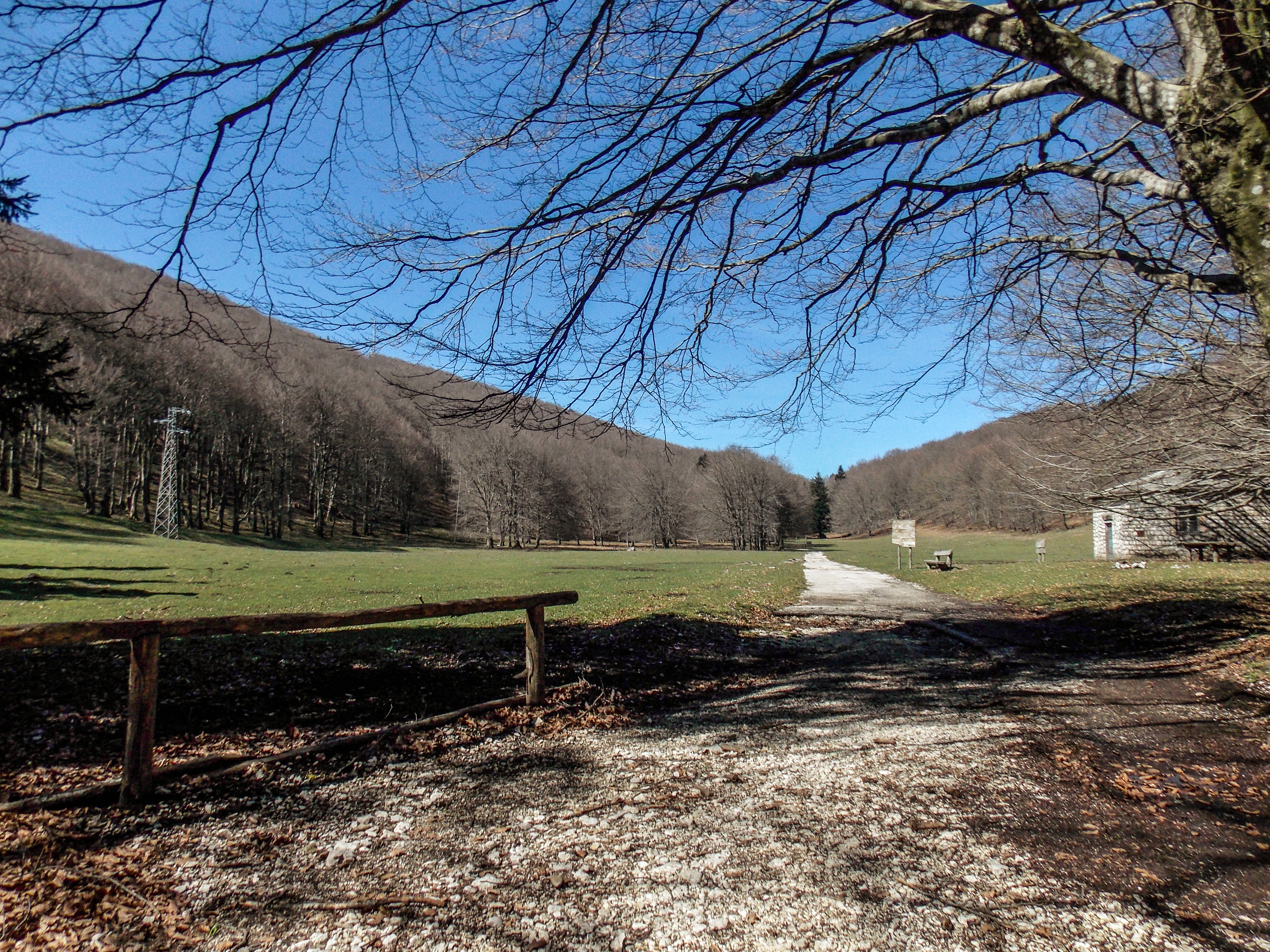 La conca di Piano Melaino sul massiccio del Taburno, nel comune di Tocco Caudio (BN)